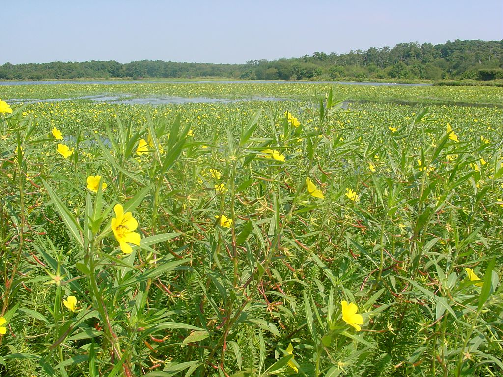 Jussie colonisant un étang